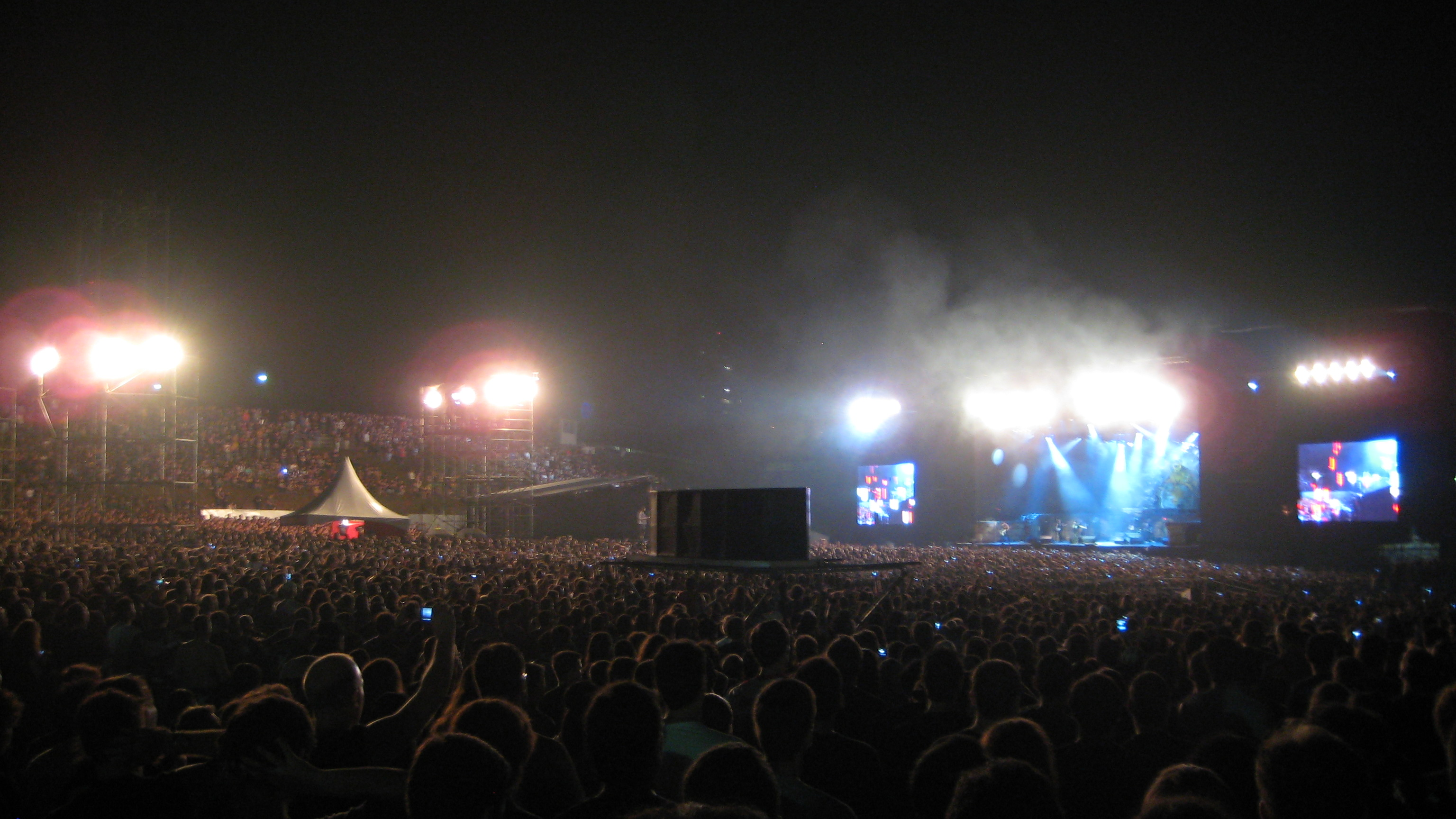 noite Iron Maiden 03/2009